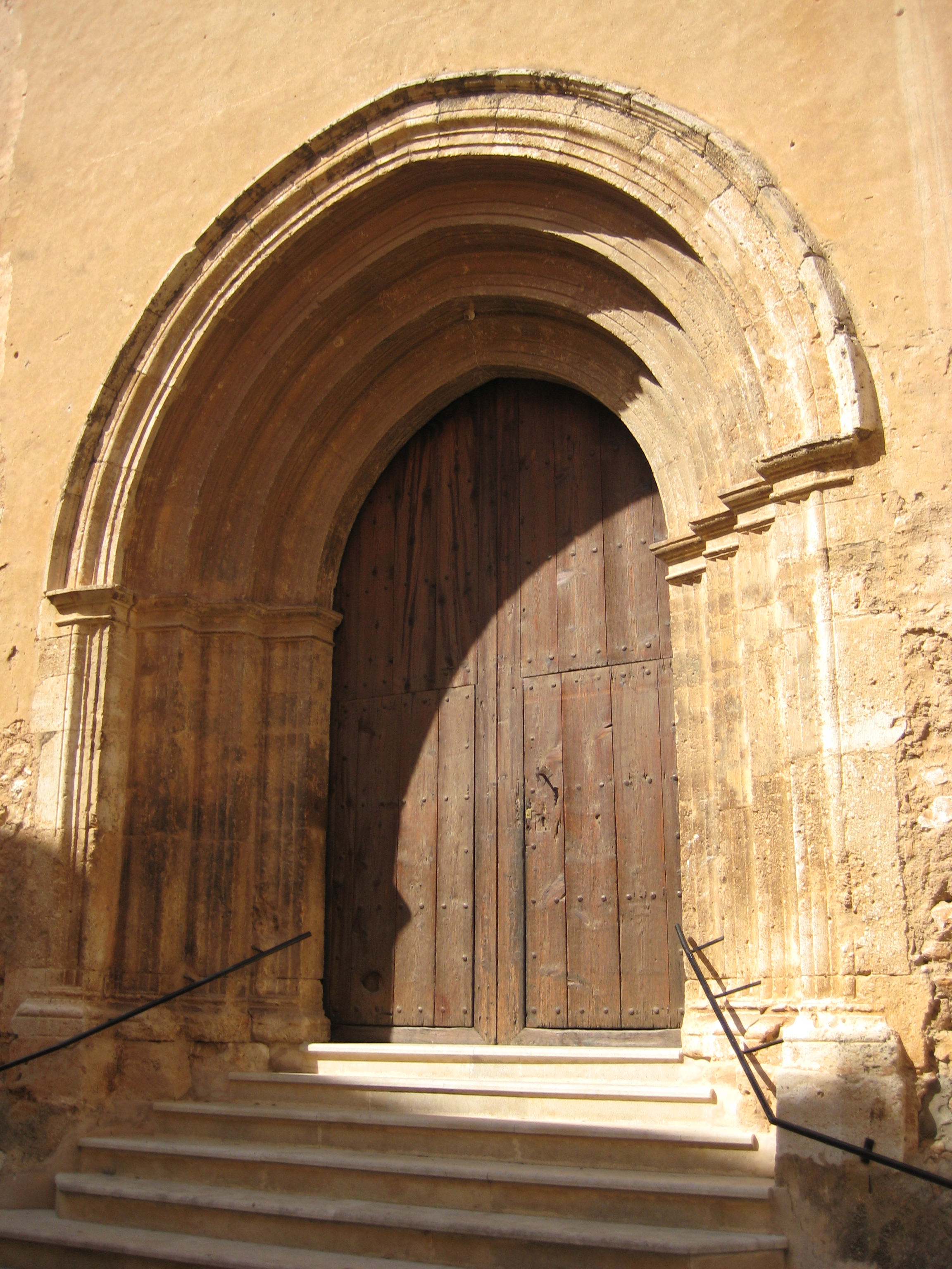 Portada principal de l'església de Sant Miquel Arcàngel de Canet lo Roig (Baix Maestrat)